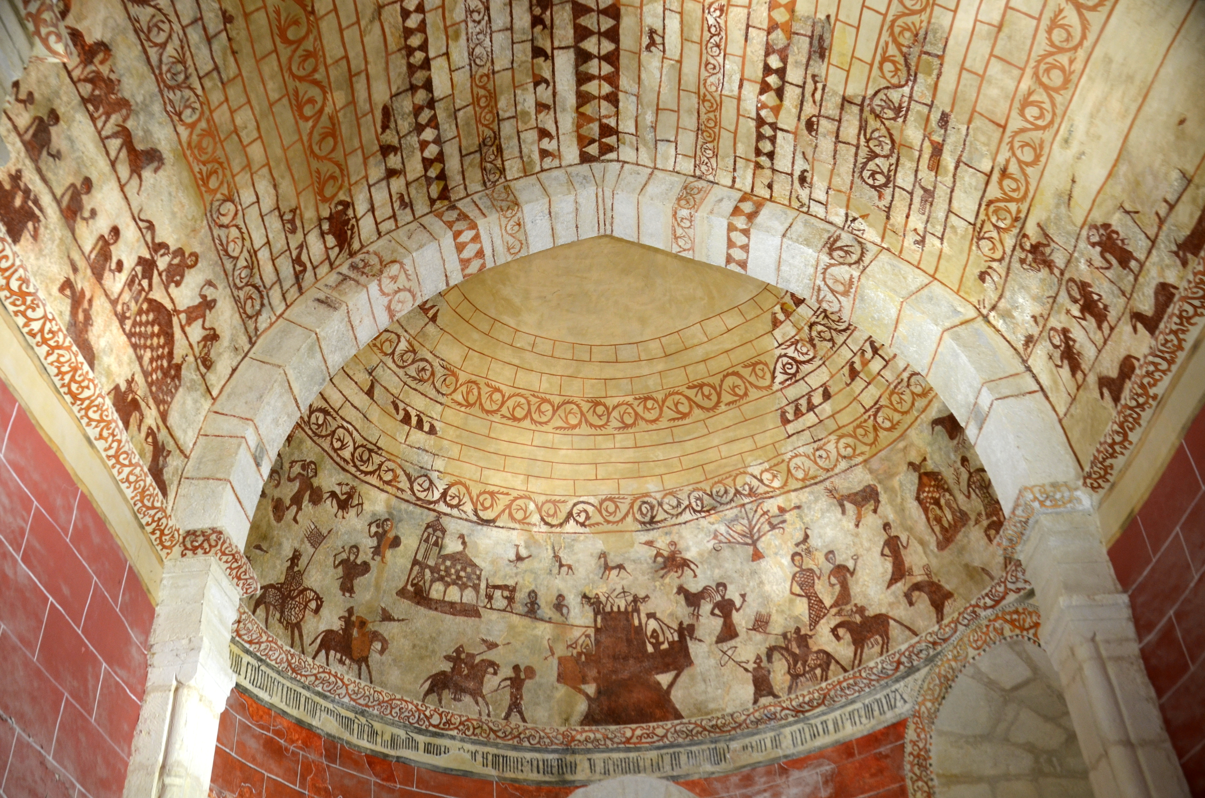 Alaitzako eliza erromanikoa, bere margolan ikusgarri bezain bereziekin.